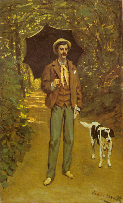 L'homme au parasol - L'homme au parapluie - Portrait de V. JaquemontThe man with a parasollabel QS:Lfr,"L'homme au parasol - L'homme au parapluie - Portrait de V. Jaquemont"label QS:Len,"The man with a parasol"